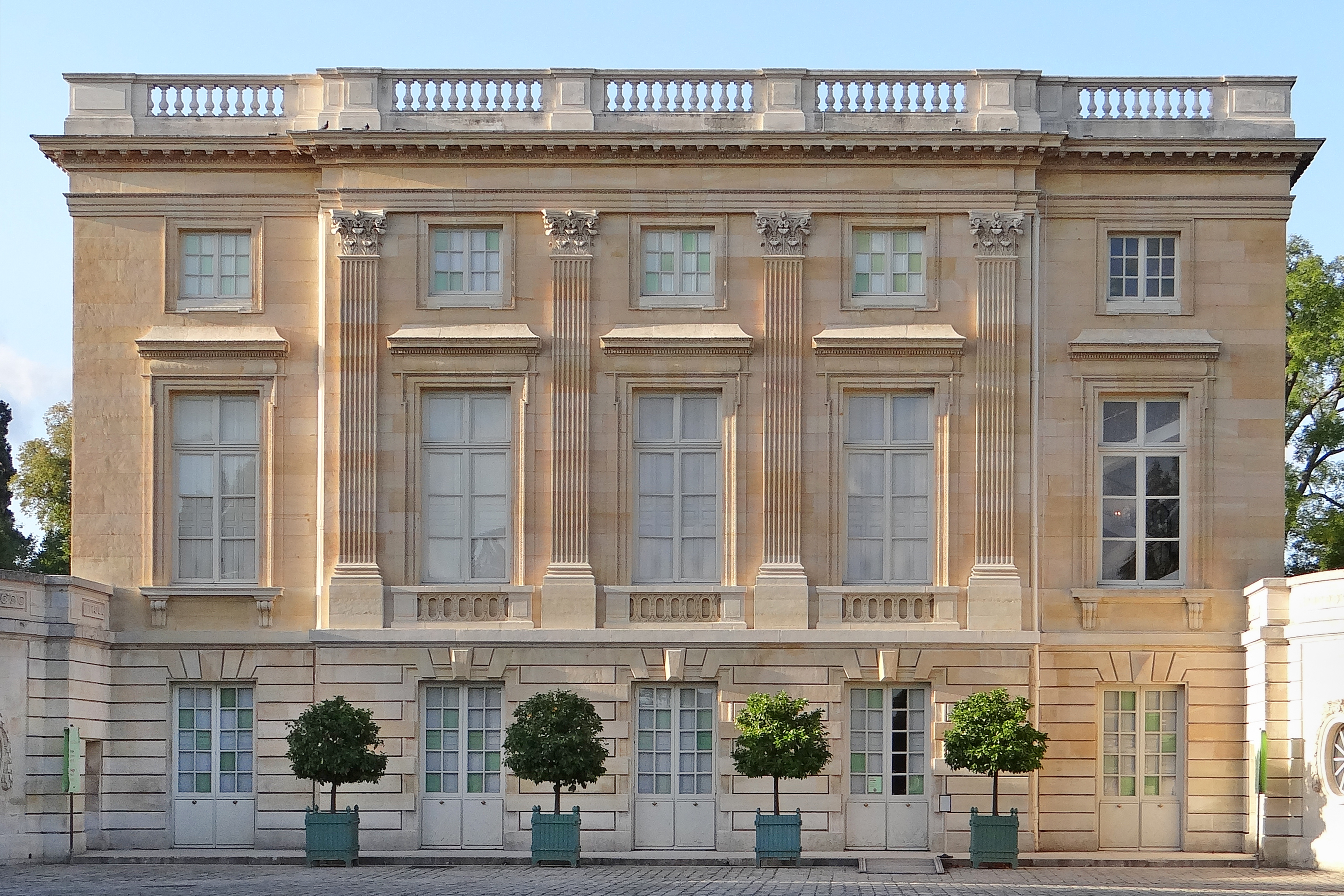 Le Petit Trianon a été édifié en 1750 par l'architecte Gabriel.